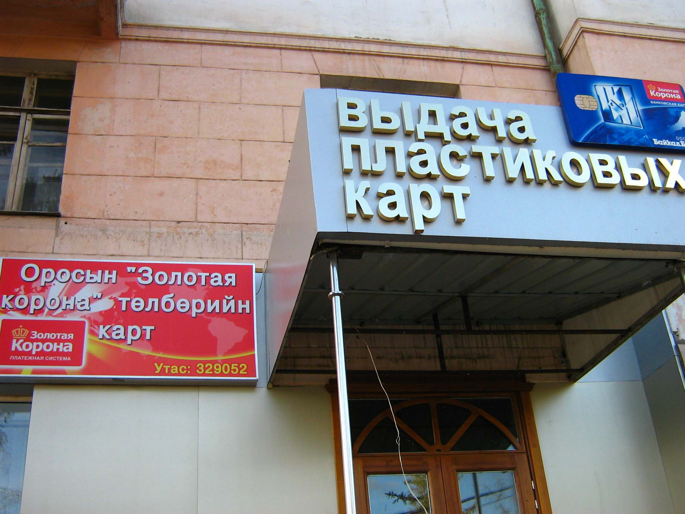 Отделение по выдаче пластиковых карт платёжной системы "Золотая корона" в Улан-Баторе, Монголия